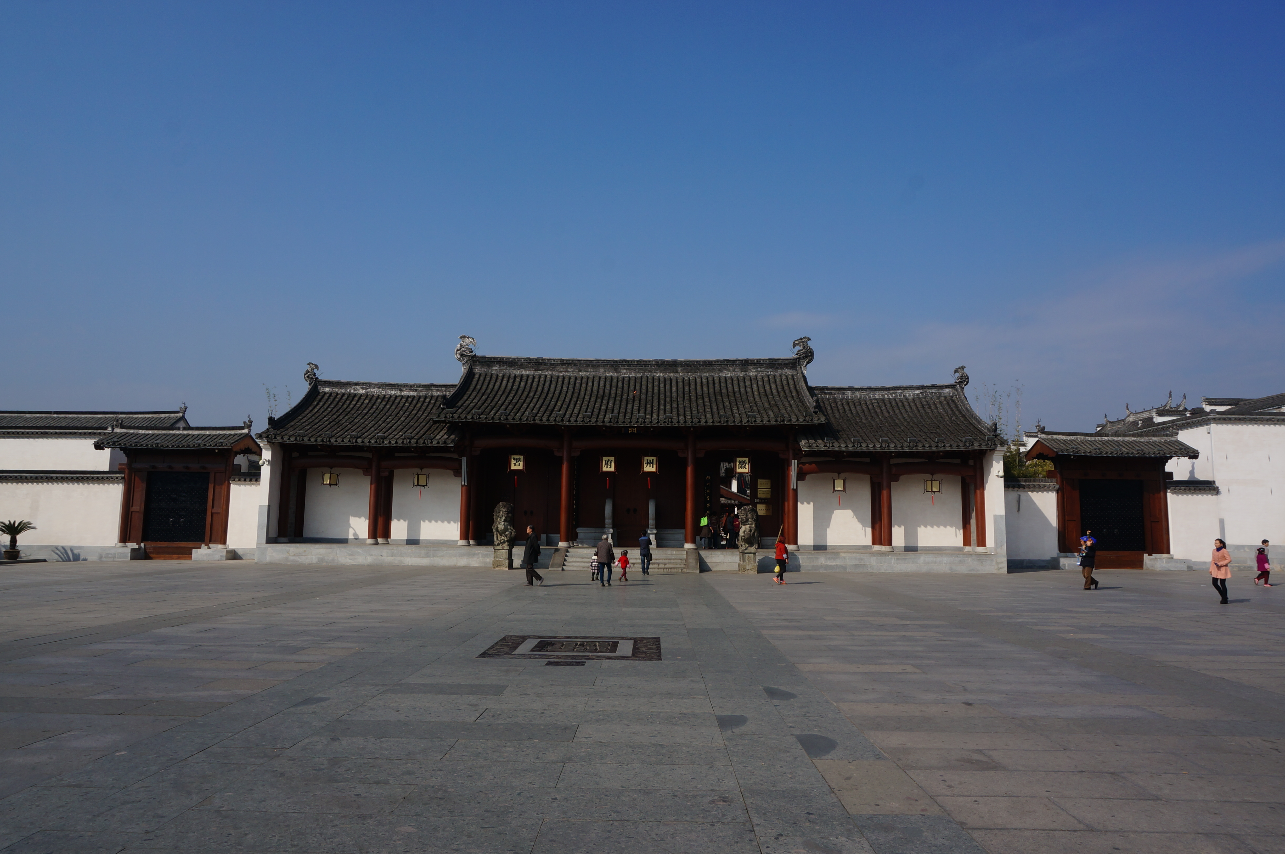 徽州府衙，仪门。